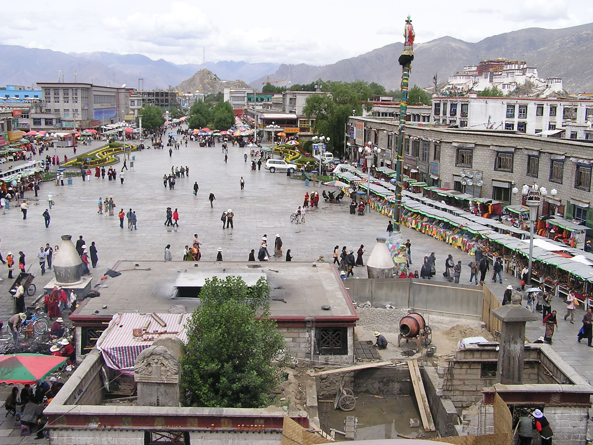 Jokhang Monastery 16.